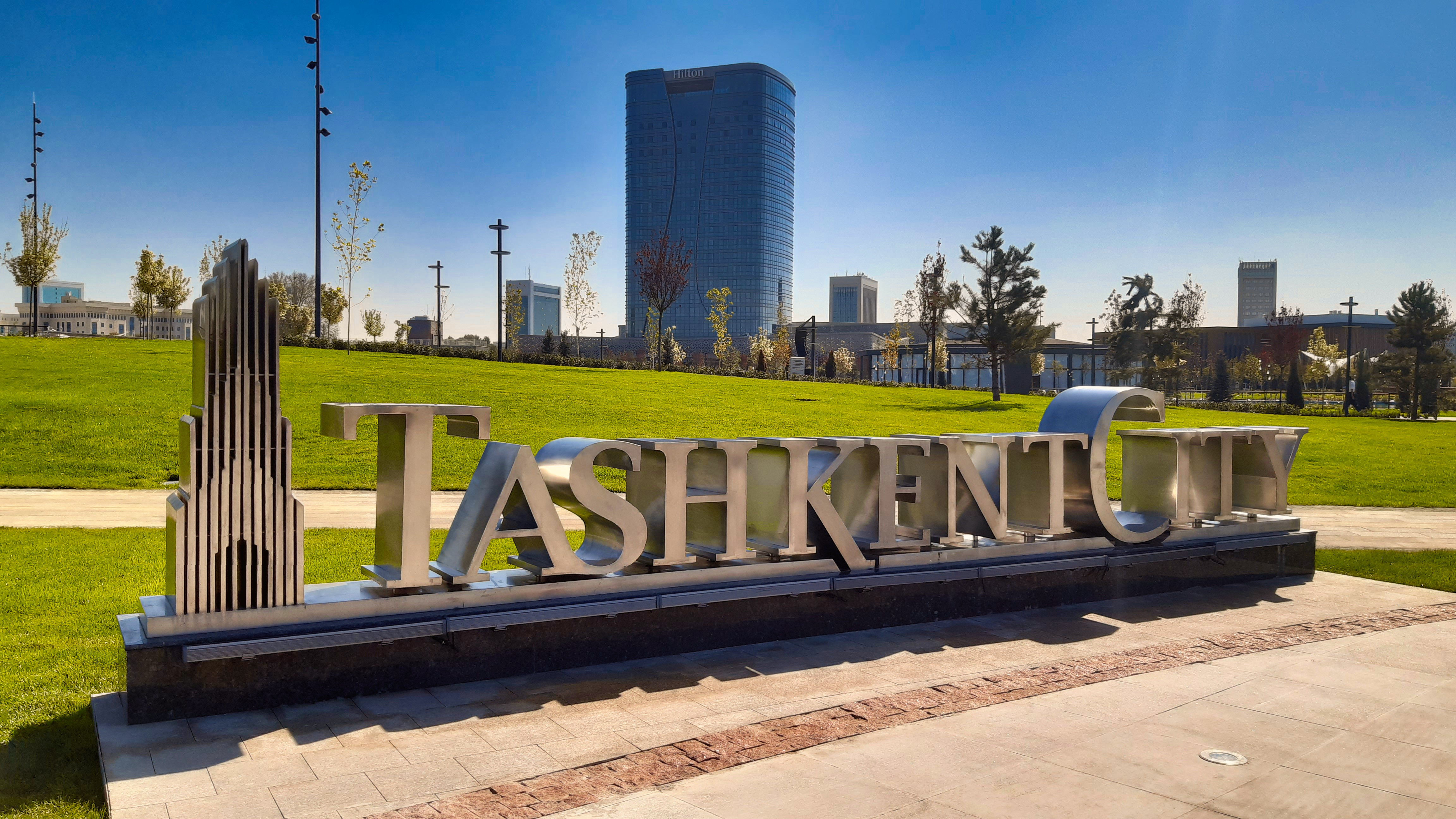 Декоративная надпись "Tashkent City"